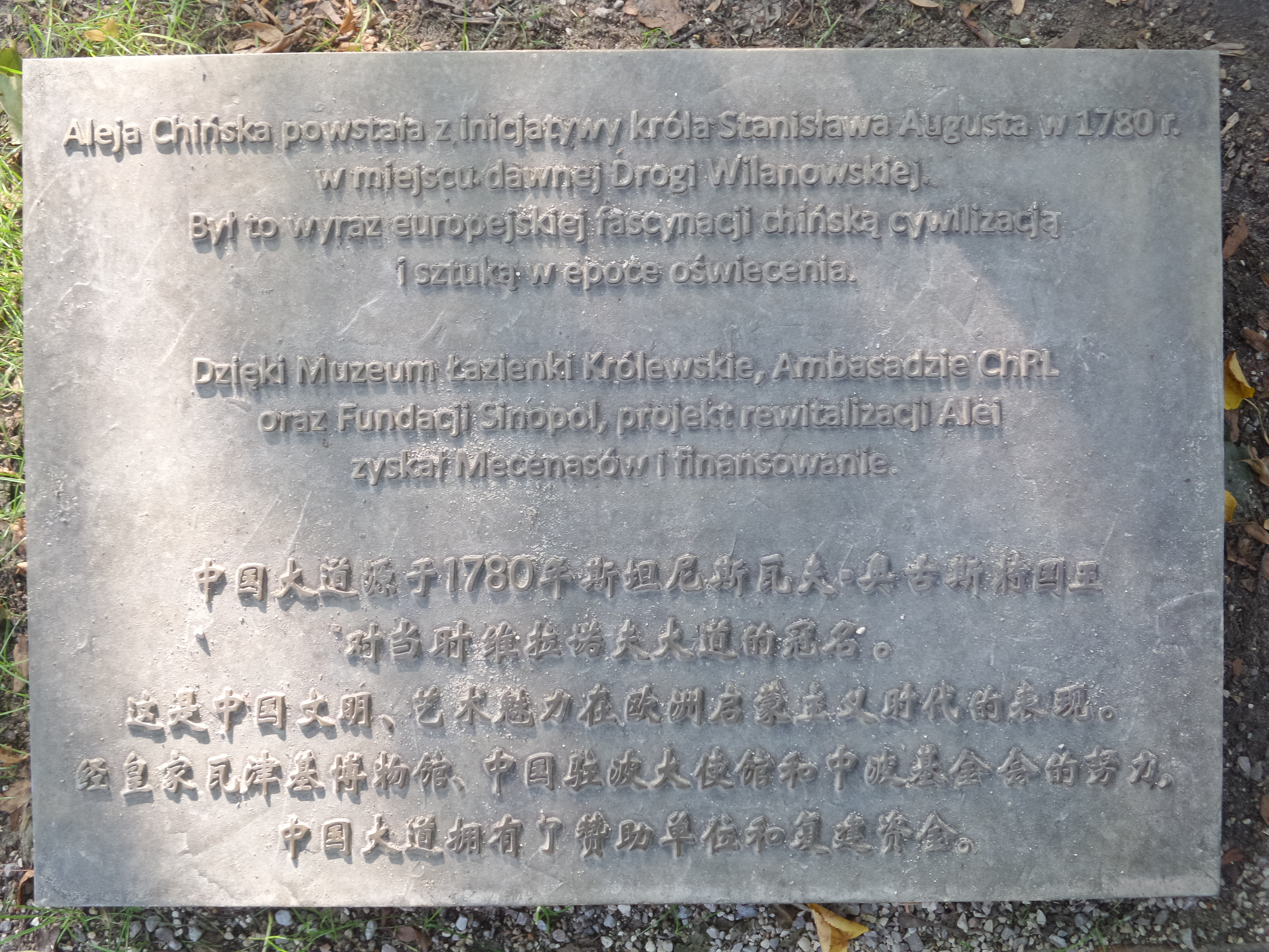 Warszawa, zespół pałacowo-parkowy Łazienki, XVII, XIX